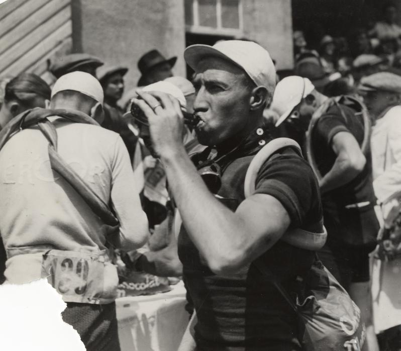 Spaarnestad Photo, SFA022004651 De Belg Alphonse Schepers neemt een slok water bij een bevoorrading. Plaats onbekend. Tour de France 1933. Collectie SPAARNESTAD PHOTO/Het Leven The Belgian cyclist Alphonse Schepers having a drink. Tour de France 1933. Location unknown. Voor meer informatie en voor meer foto’s uit de collectie van Spaarnestad Photo, bezoek onze Beeldbank: U kunt ons helpen onze kennis van de fotocollecties te verrijken door tags en commentaren toe te voegen. Herkent u mensen of locaties of heeft u een bijzonder verhaal te vertellen bij één van de foto’s, laat dan een reactie achter (als u ingelogd bent bij Flickr) of stuur een mailtje naar: You can help us gain more knowledge on the content of our collection by simply adding a comment with information. If you do not wish to log in, you can write an e-mail to